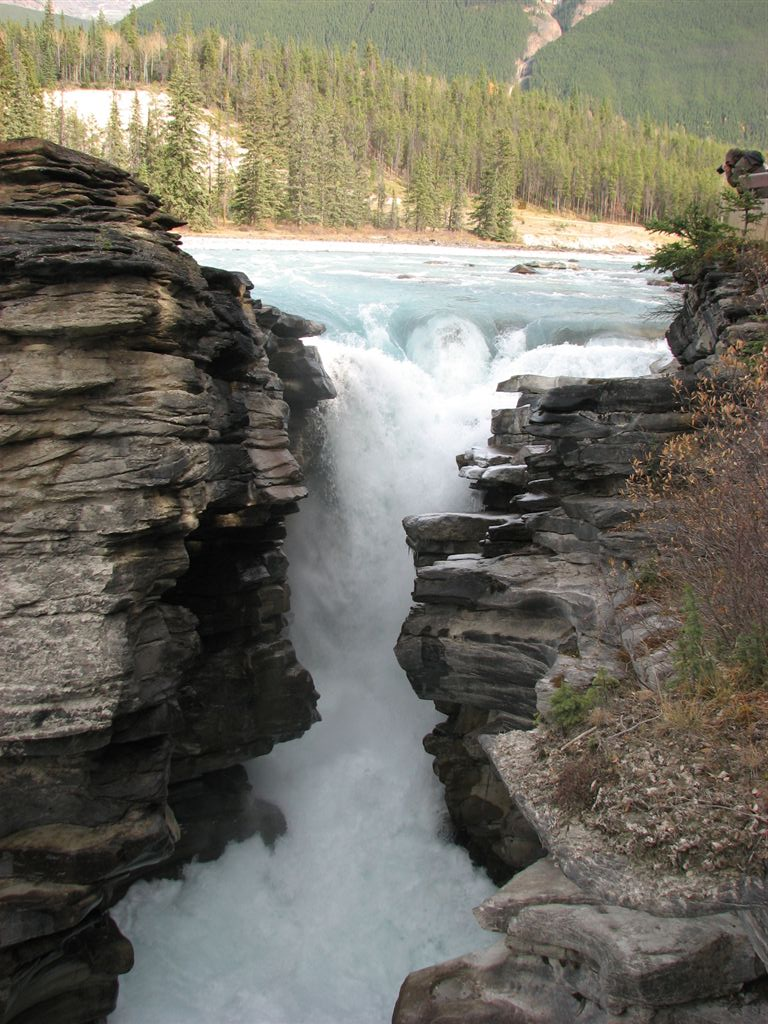 Athabasca Falls